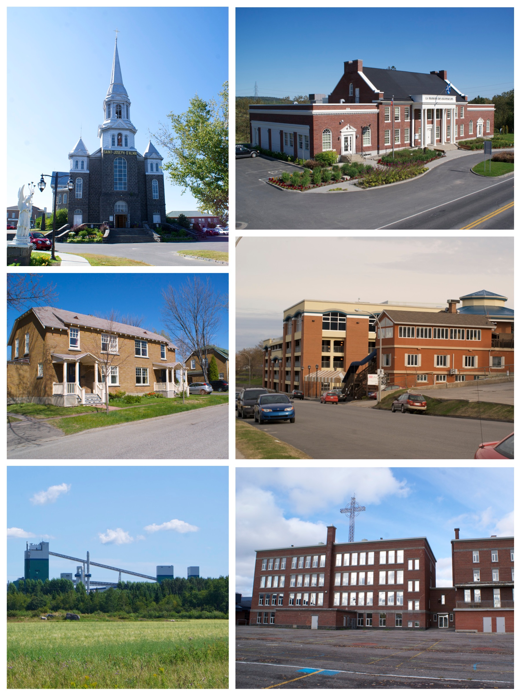 Ville d'Alma